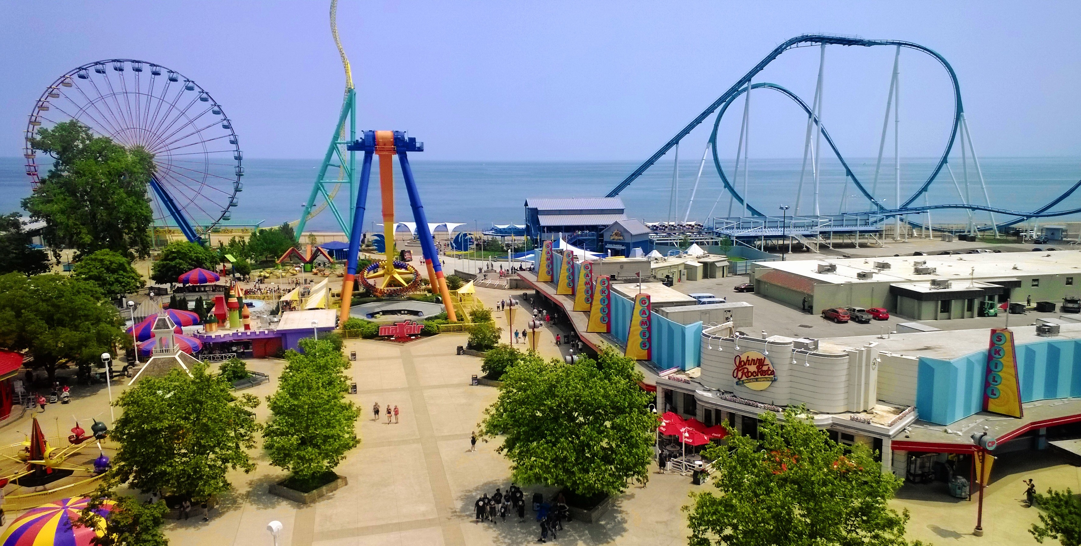 Cedar Point